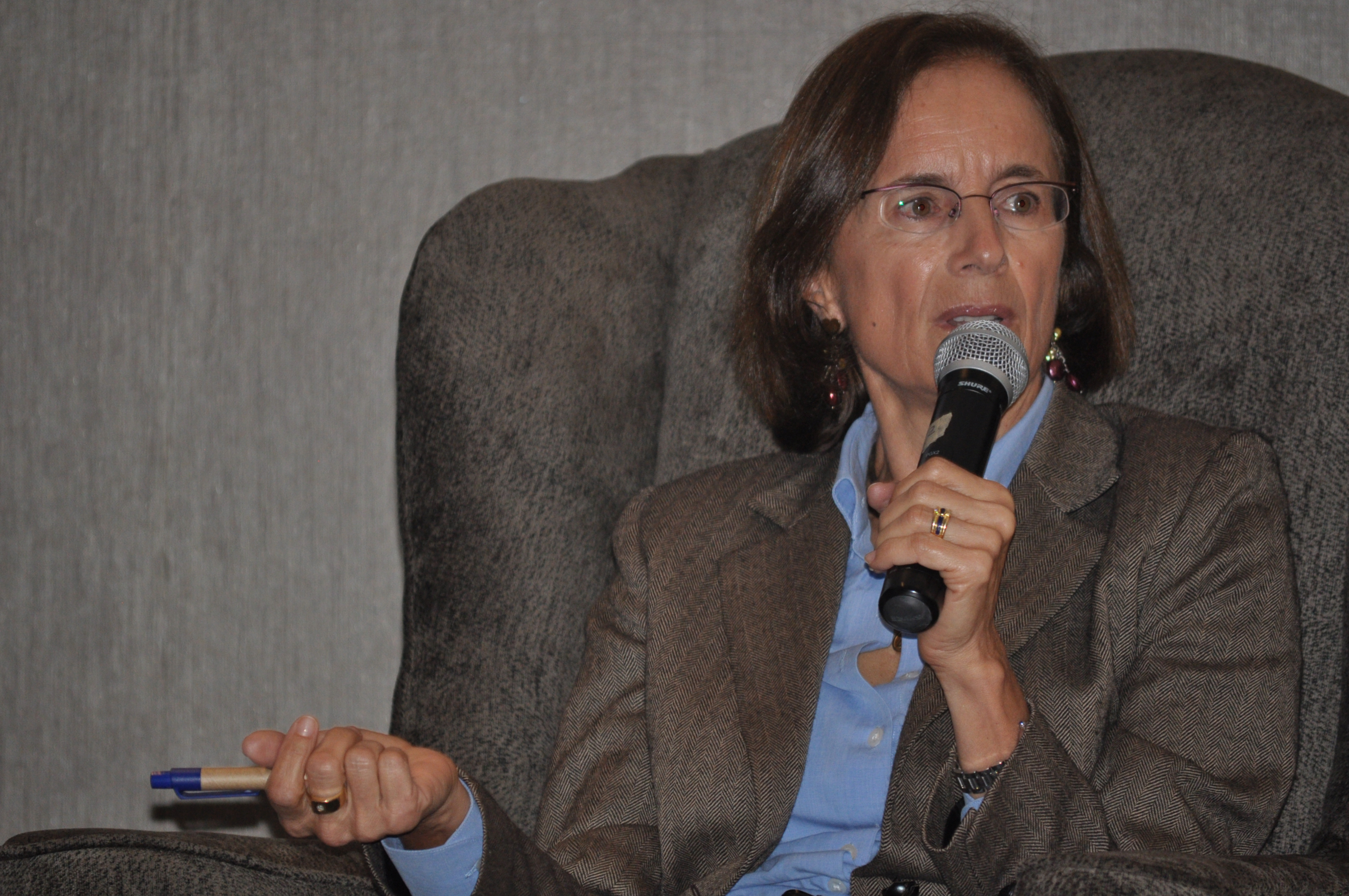 Salud Hernández Mora en una conferencia.